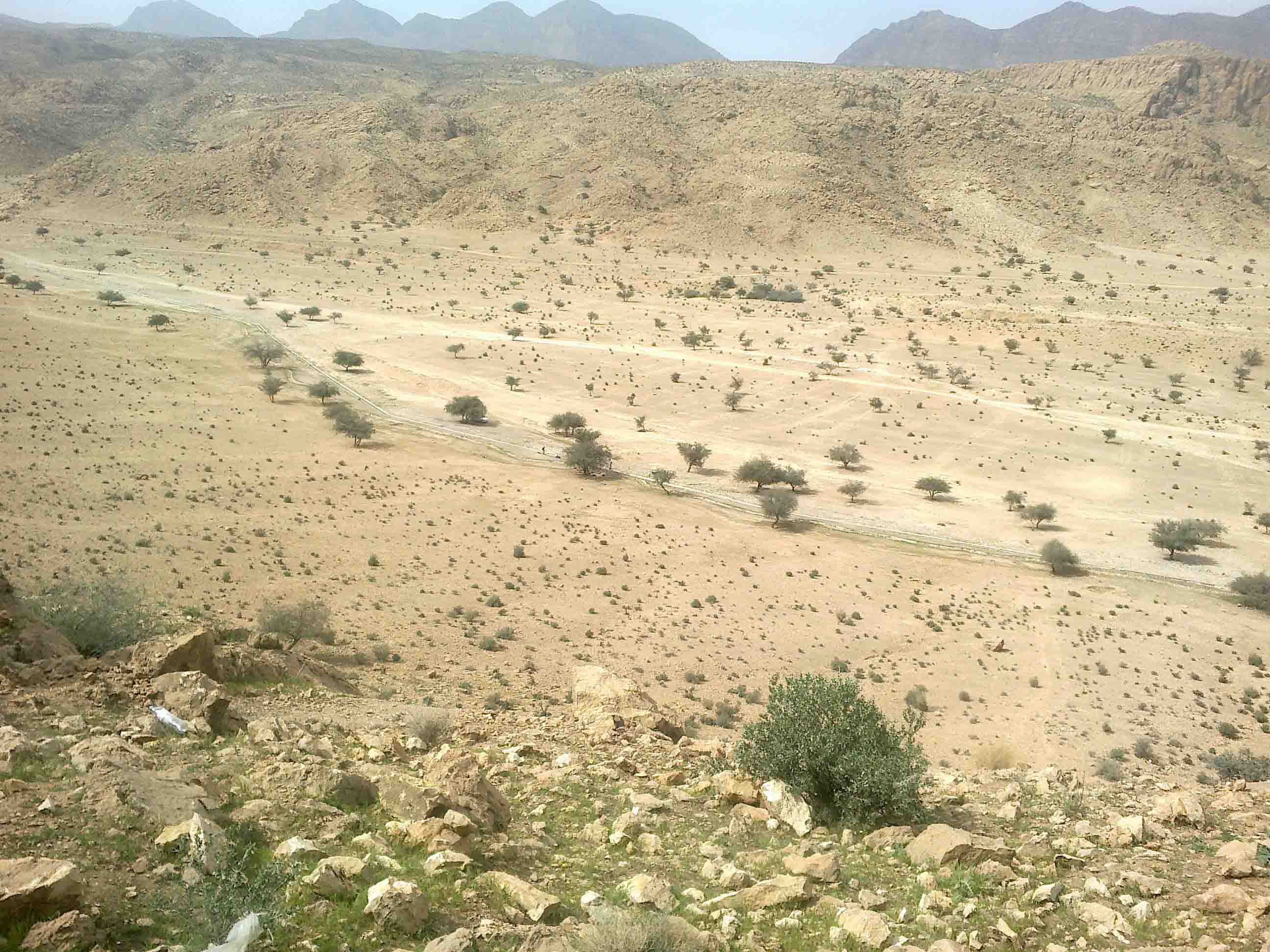 منطقه تفریحی تنگه حاجی‌آباد-نمای باز